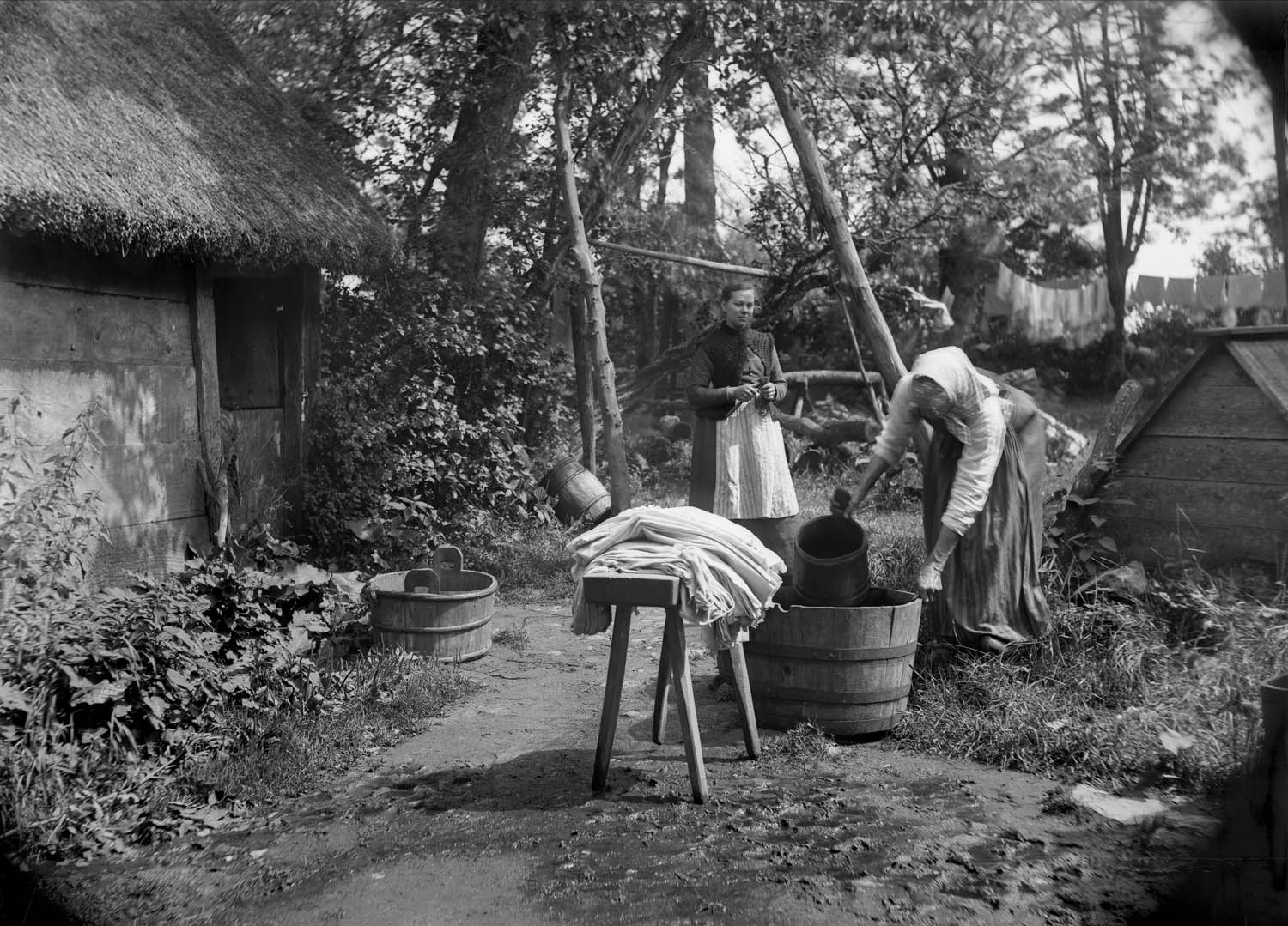 Depicted person: Hanna Lundqvist, Sverige (1865-1938) depicted place: Halland, Årstads hd, Slöinge, Oktorp, Oktorp nr 2 (Sverige (SE))